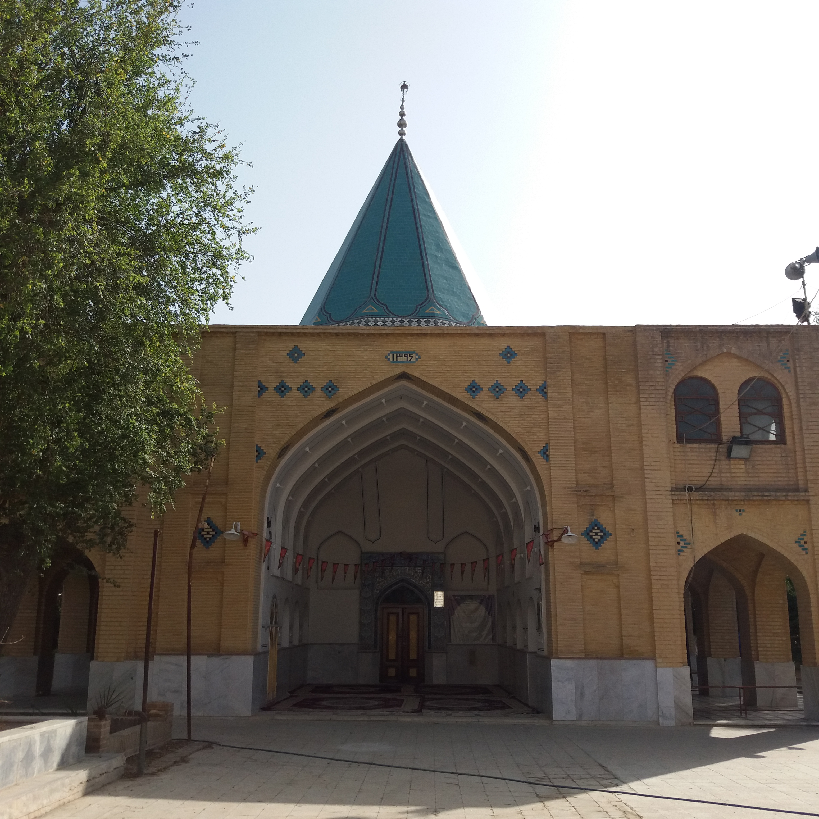 بقعه شاه رکن الدین مربوط به سدهٔ ۱۲ ه.ق است و در دزفول، محله شاه رکن الدین ـمرکز محله واقع شده و این اثر در تاریخ ۲ خرداد ۱۳۵۶ با شمارهٔ ثبت ۱۳۷۷ به‌عنوان یکی از آثار ملی ایران به ثبت رسیده است